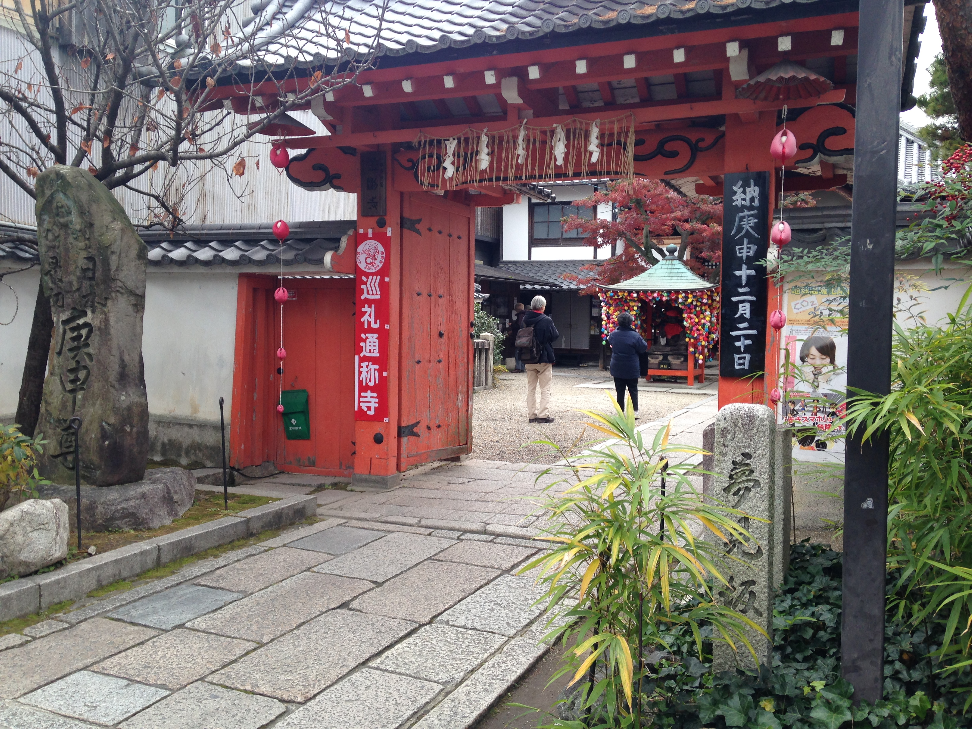 夢見坂にある金剛寺